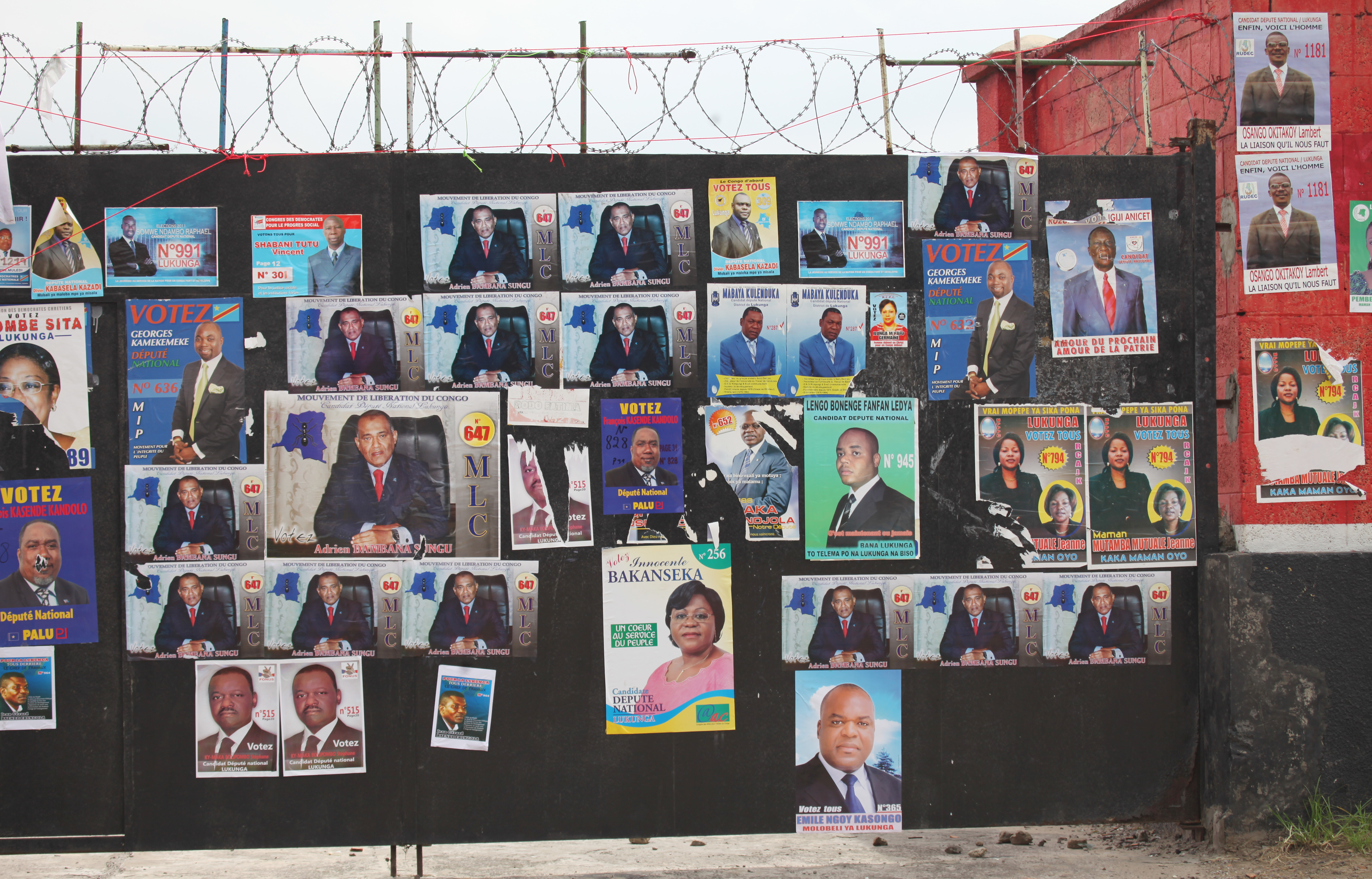 2011/11/07-/Début de la Campagne électorale Kinshasa Photo MONUSCO/Myriam Asmani